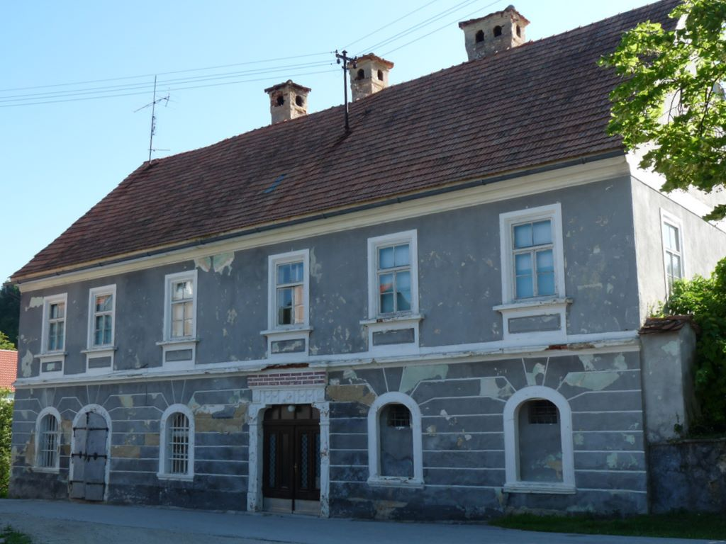 Pilštanj